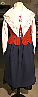 Titel SLM 14088 - Folkdräkt från Floda i Södermanland Anmärkning Folkdräkt från Floda i Södermanland bestående av: svartrandig yllekjol, rödrandigt livstycke, blått midje förkläde, röd bindmössa, stycke, vitt broderat halskläde, broderimönster till halskläde, röda strumpor (långa) i fodral, röda (knä) strumpor, röda (ylle) strumpor, överdel av vitt linne, silver brosch med ask och 3 st silverknappar. Astrid fick denna Flodadräkt tillsammans med Västra Vingåkers dräkten (SLM 14087) på 1960-talet då hon dansade i folkdanslaget i Stockholm. De inköptes på Hemslöjden i Nyköping. Hon broderade halsklädet till Floda dräkten själv. Hon använde dräkterna vid högtidliga tillfällen och när hon dansade. Astrids pappa Gustaf Gustafsson född 1881 kommer i från Stora Malm i Floda socken och Astrids mamma Ester Kristina född 1894 kommer i från Söderspånga, Västra Vingåkers socken.